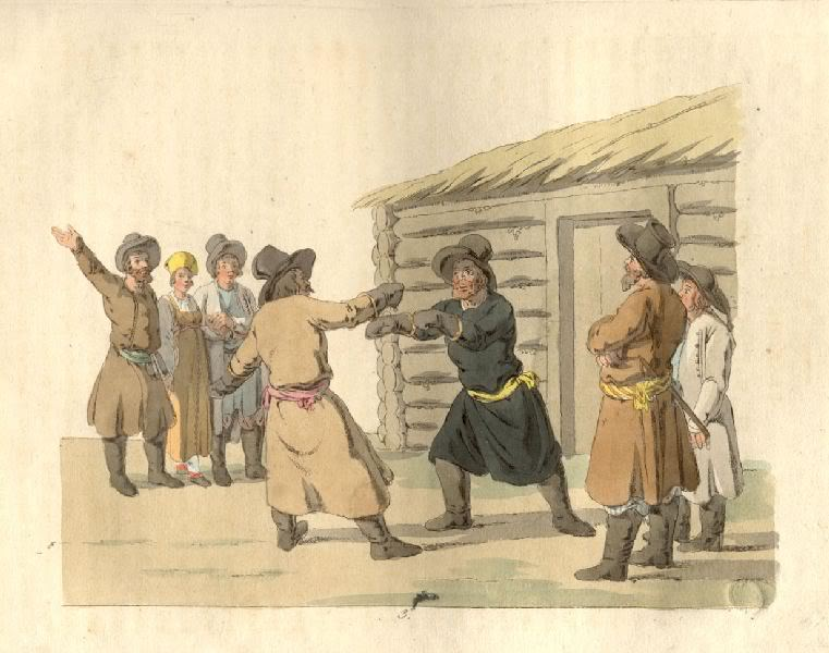 Кулачный бой